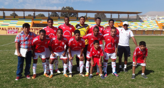 Equipo de Defensor Zarumilla del 2013.